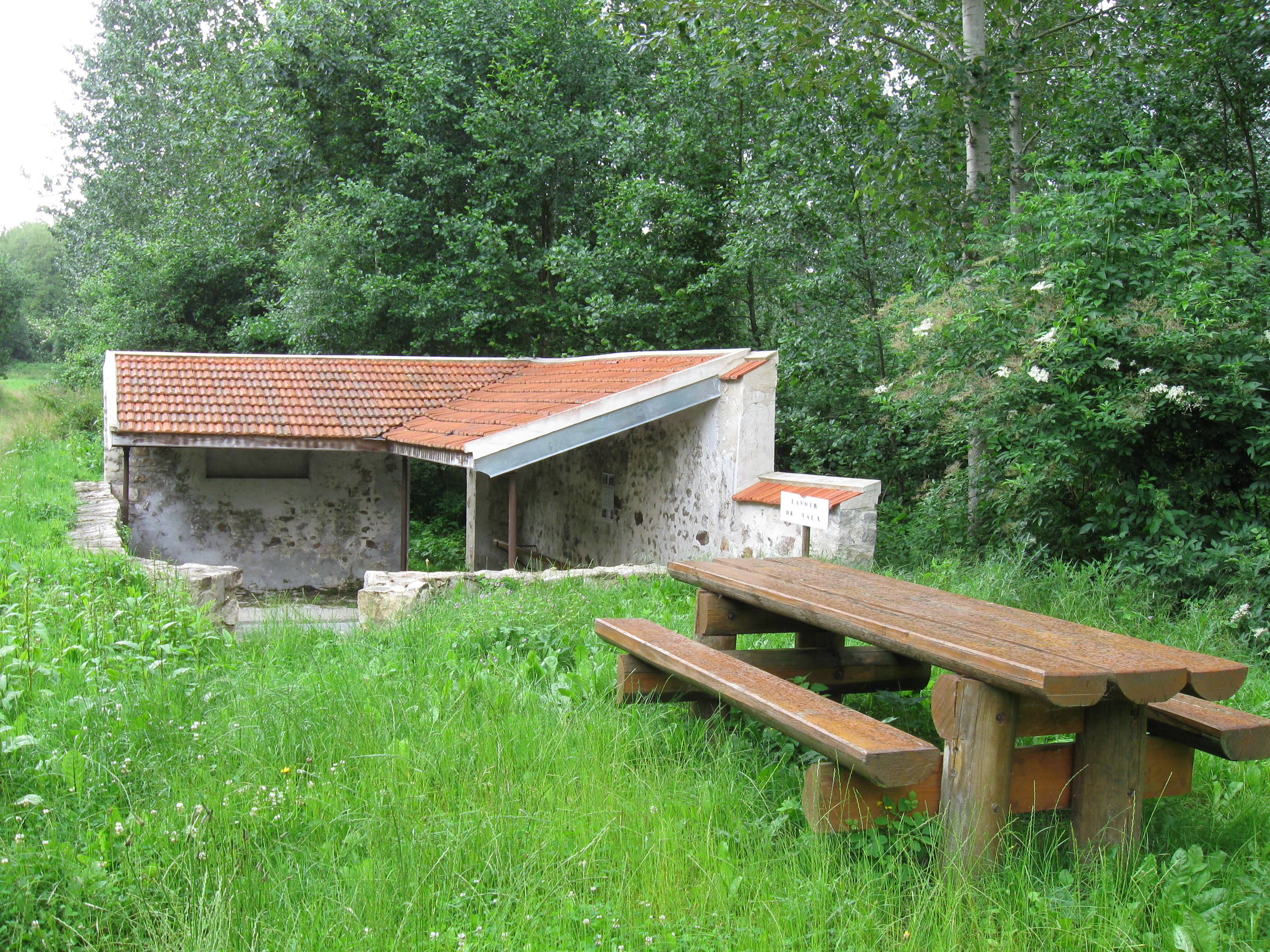 Lavoir de Vaux-sous-Coulombs entièrement rénové en 2010; (commune de Coulombs-en-Valois, département de la Seine-et-Marne, région Île-de-France).